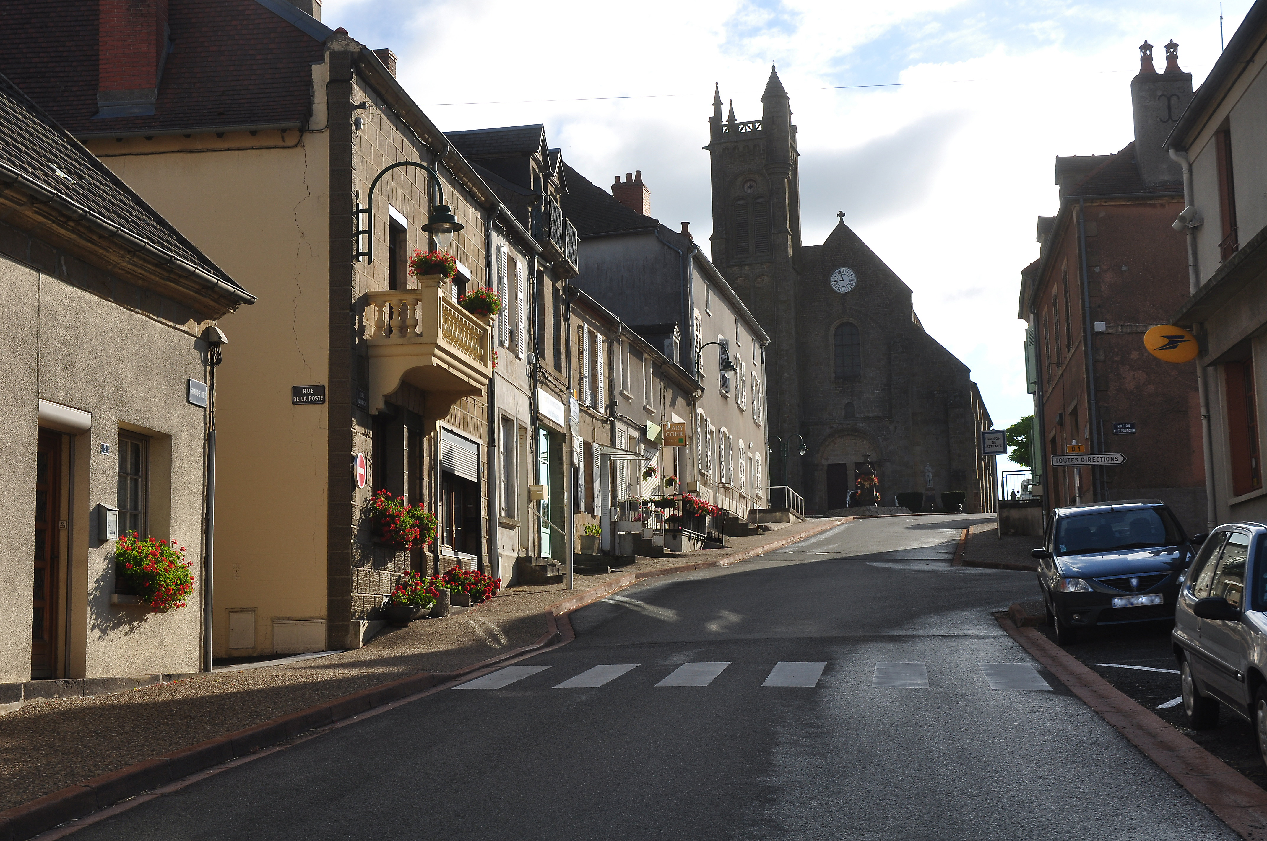 Grand Rue et rue du Marché